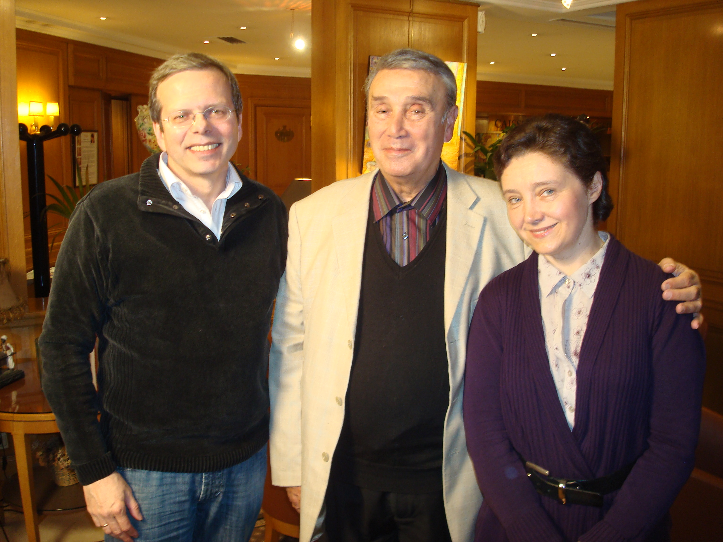 Пьер Лакотт (Pierre Lacotte) -Тихонов Никита Сергеевич - Tikhonov Nikita - Юлия Тихонова